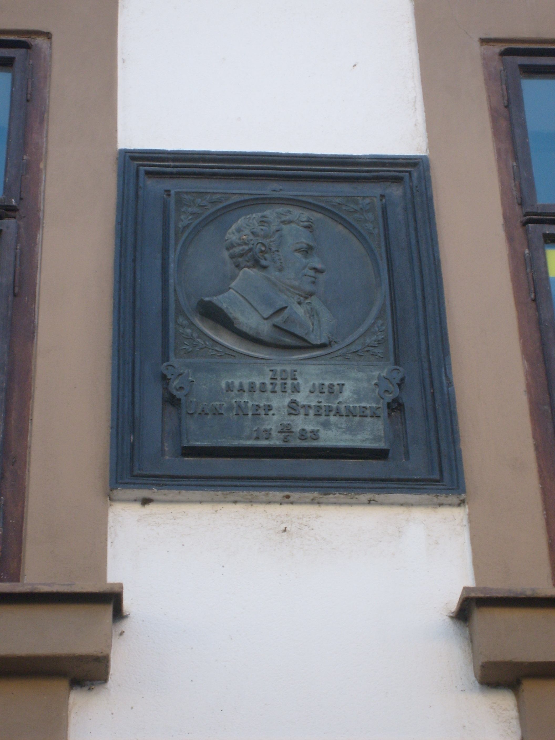 Deska na rodném domě Jana Nepomuka Štěpánka, Chrudim, Pardubice Region, Czech Republic